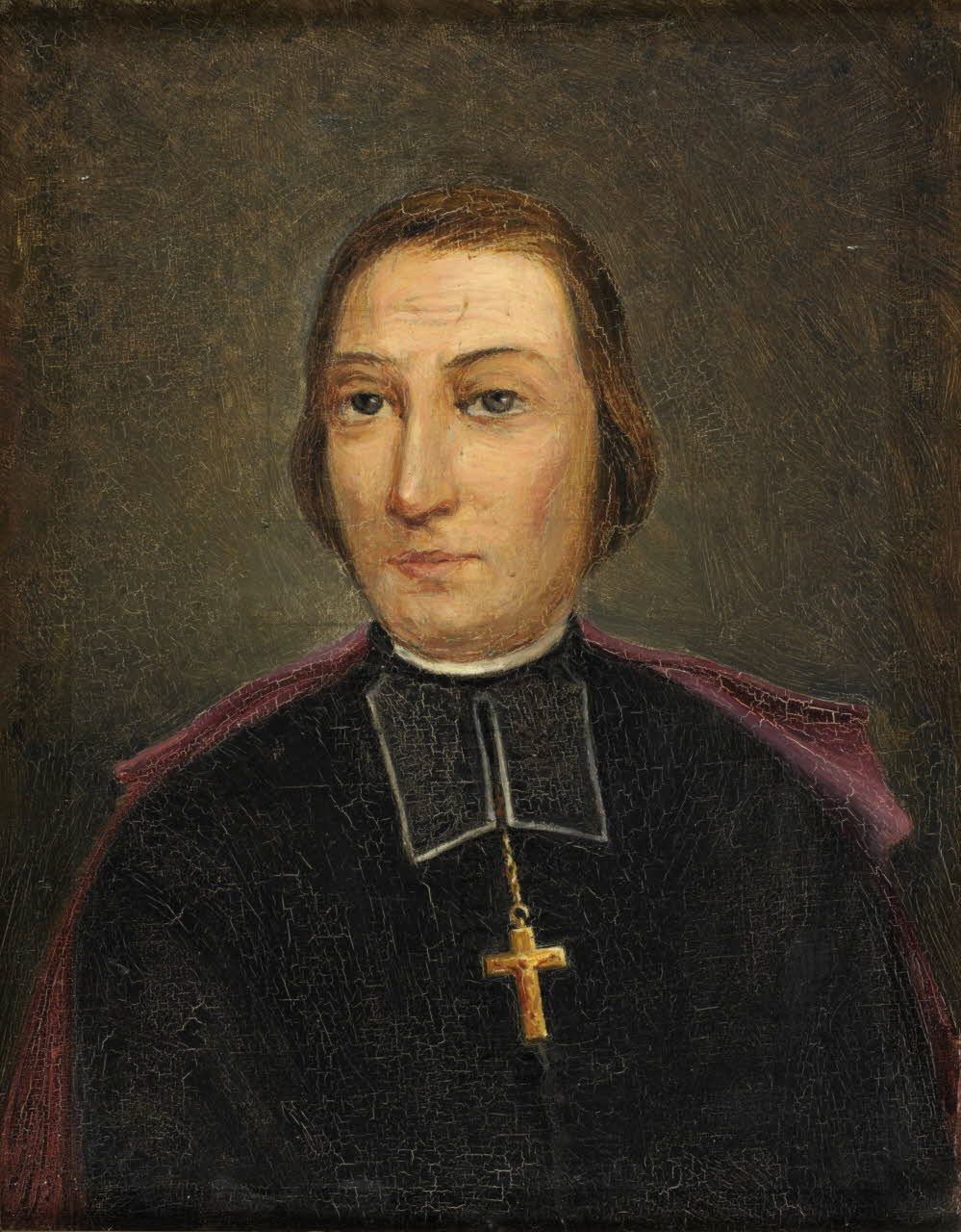 Monseigneur Henri de Solages